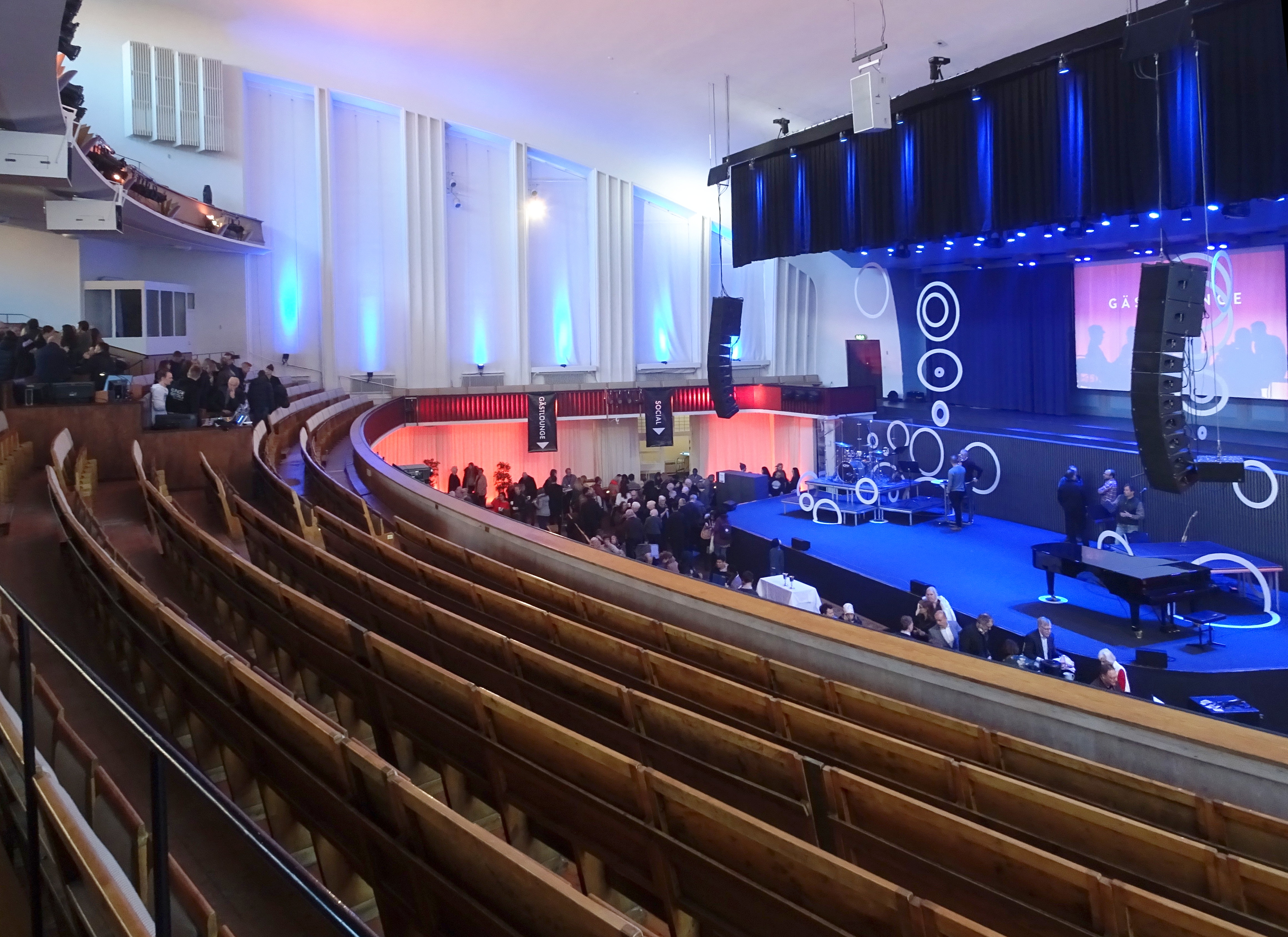 Filadelfiakyrkan, Stockholm, interiör